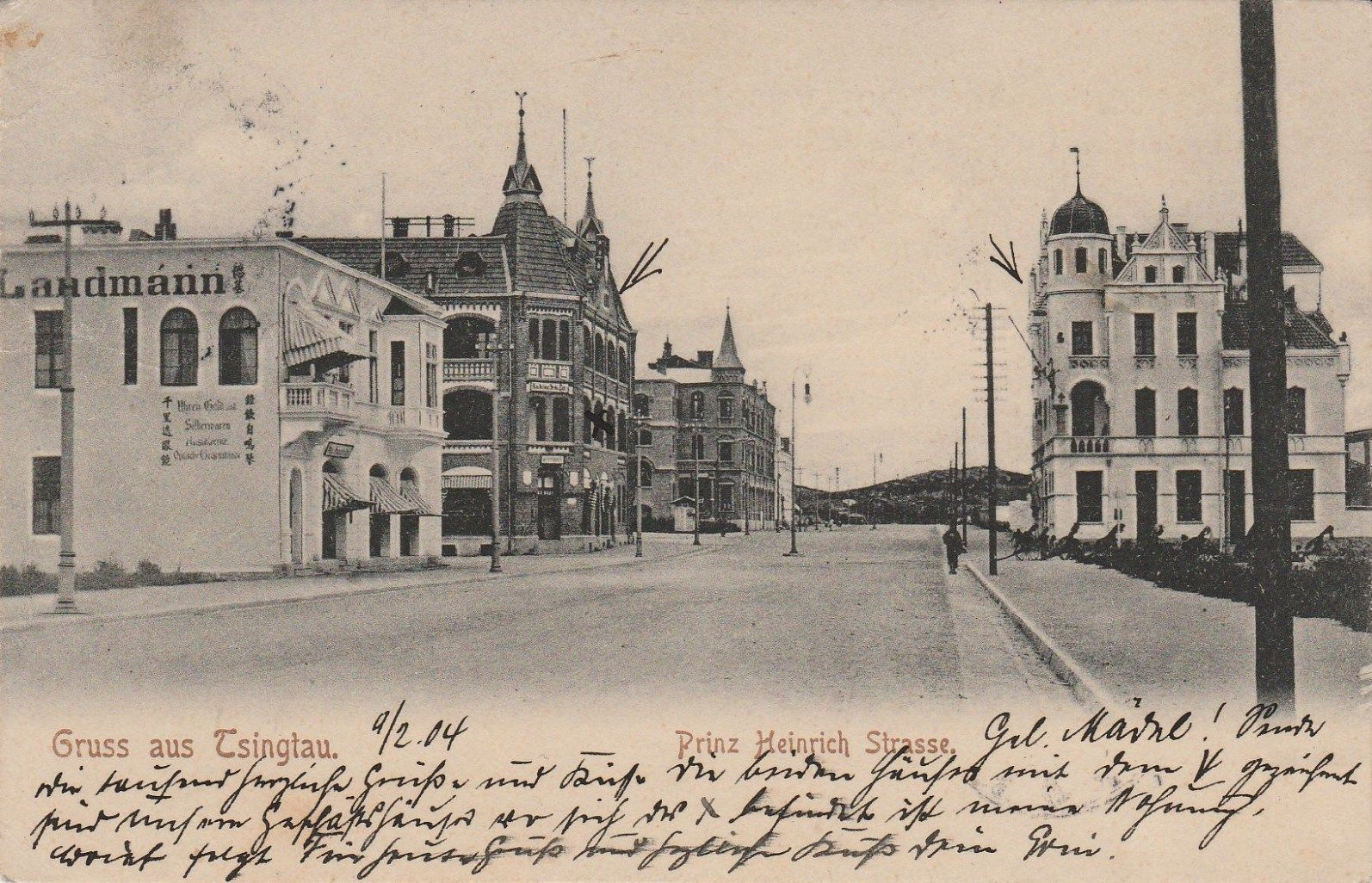 青岛广西路安徽路路口1900年代初